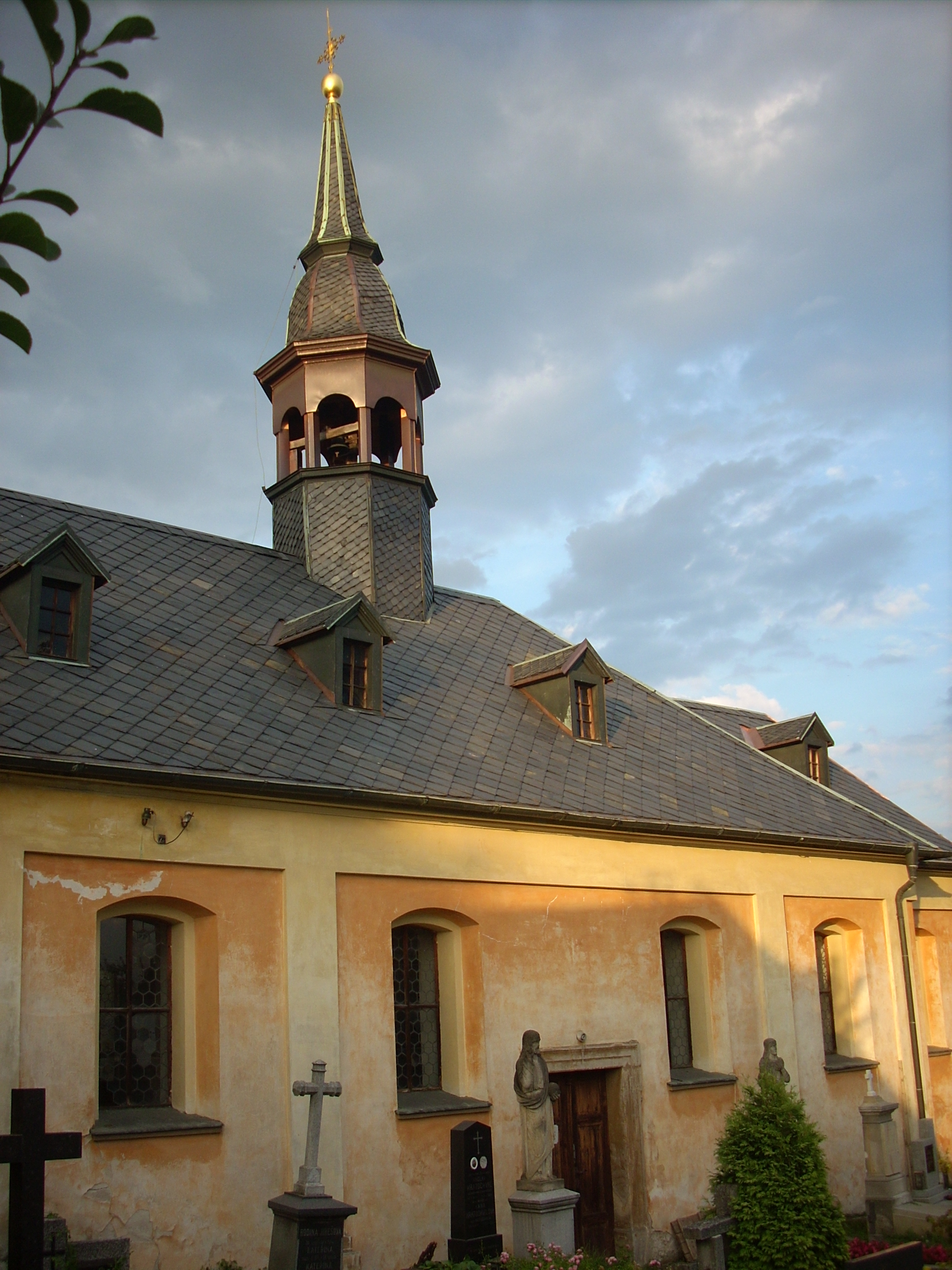 Kostel sv. Vavřince (Mukařov), střed vsi, náves, Mukařov